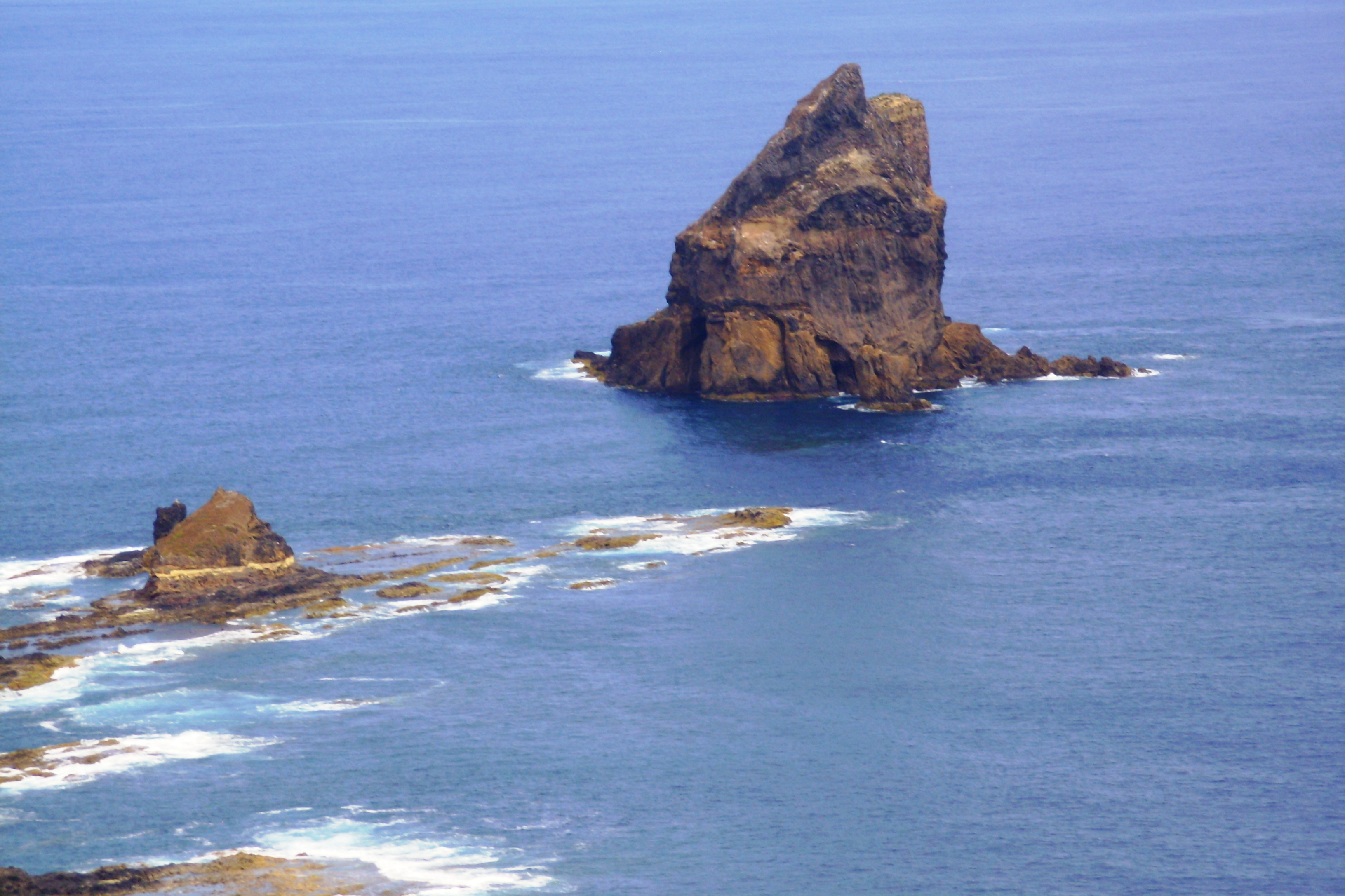 Ilhéu das Lagoinhas, freguesia de São Pedro, Concelho de Vila do Porto, ilha de Santa Maria, Açores.